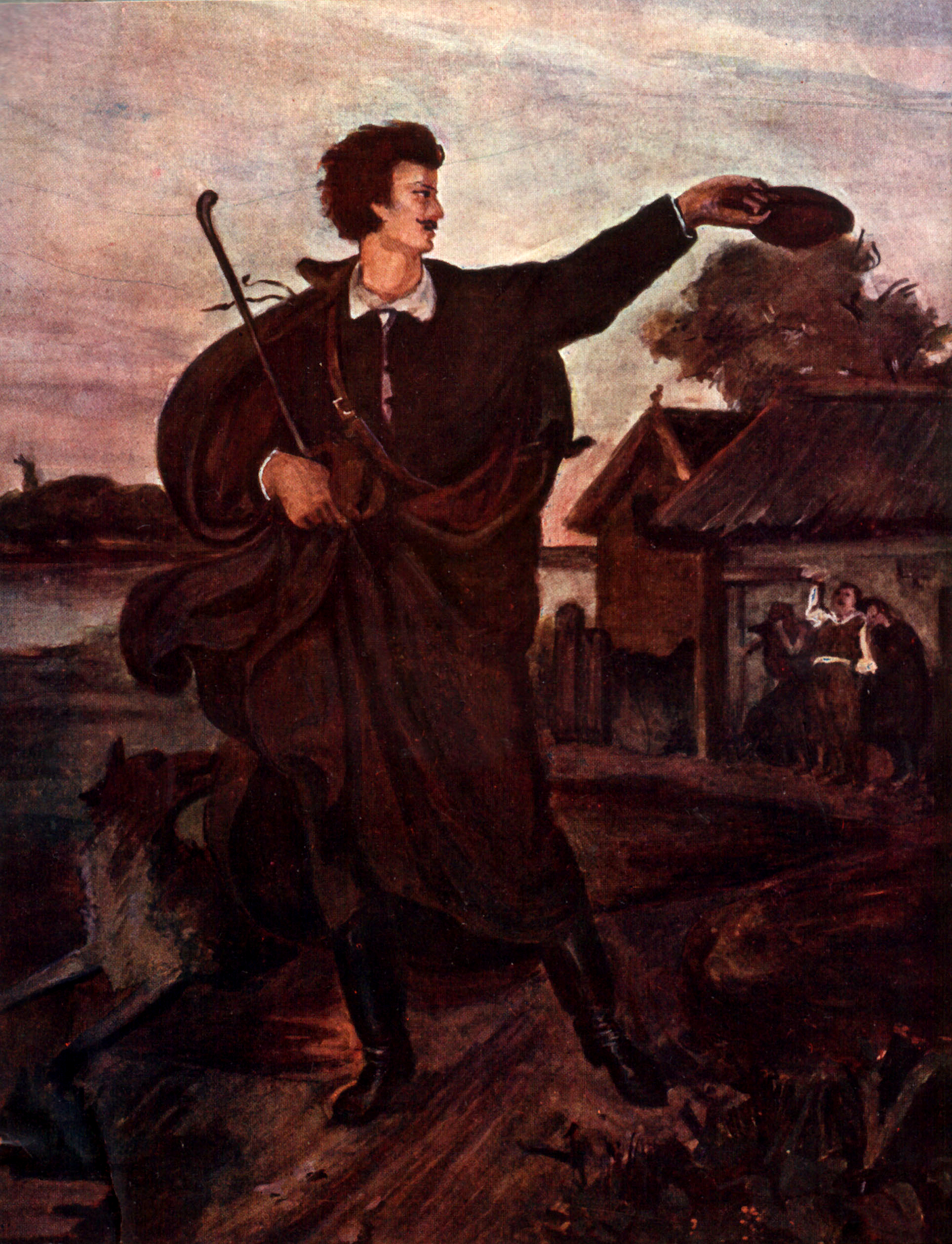 Petőfi Sándor búcsuja a szülői háztól, Munkácsy Mihály festménye. Petőfi Album, A Pesti Napló kiadása, 1908. - szkennelte szerkesztő Takkk